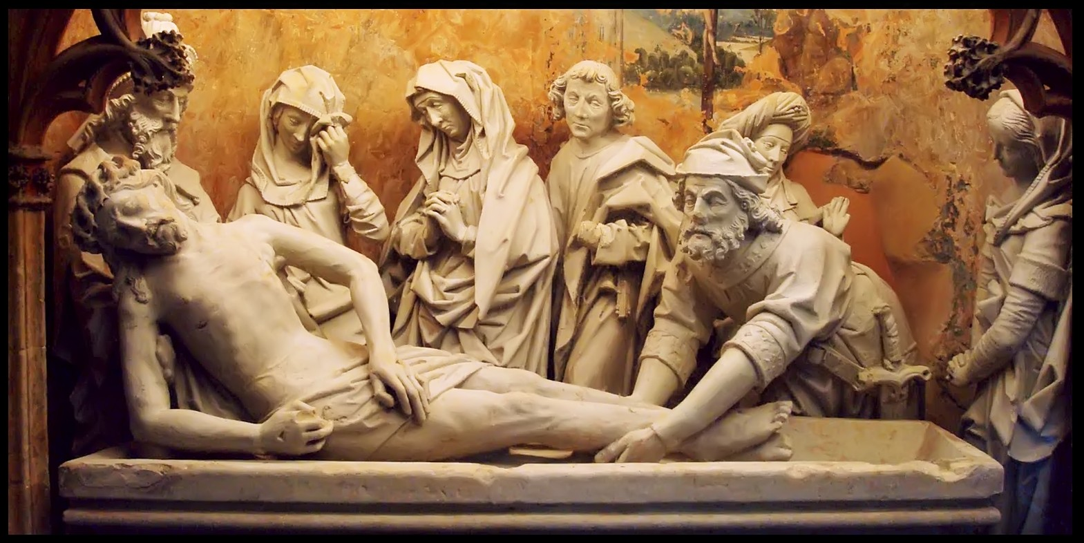 Collégiale Saint-Vincent - Mise au tombeau